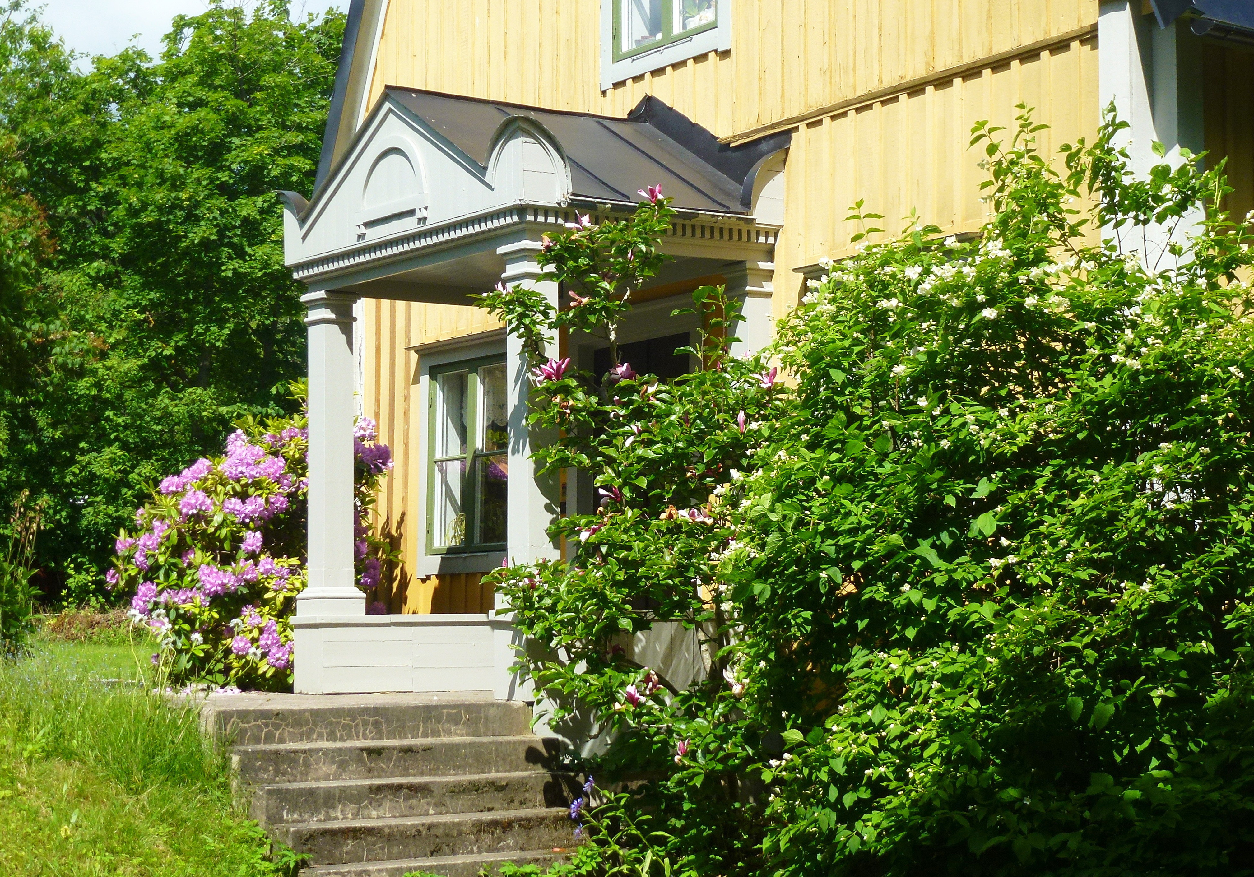 Sköndalsbro, entré